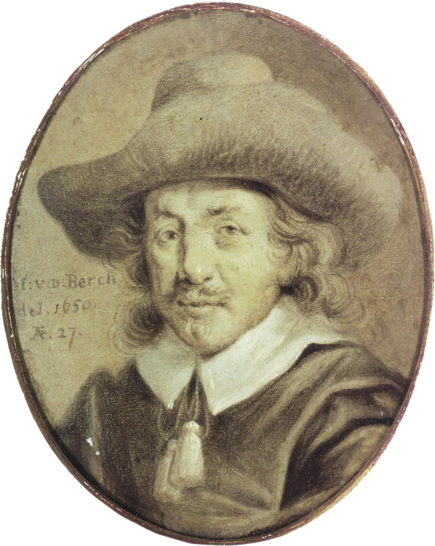 Portret van Nicolaes Berchem. oil on coppermedium QS:P186,Q296955;P186,Q753,P518,Q861259. Height: 10.3 cm (4 in); Width: 8.4 cm (3.3 in) dimensions QS:P2048,10.3U174728;P2049,8.4U174728. London, Sotheby's (16 April 2002).